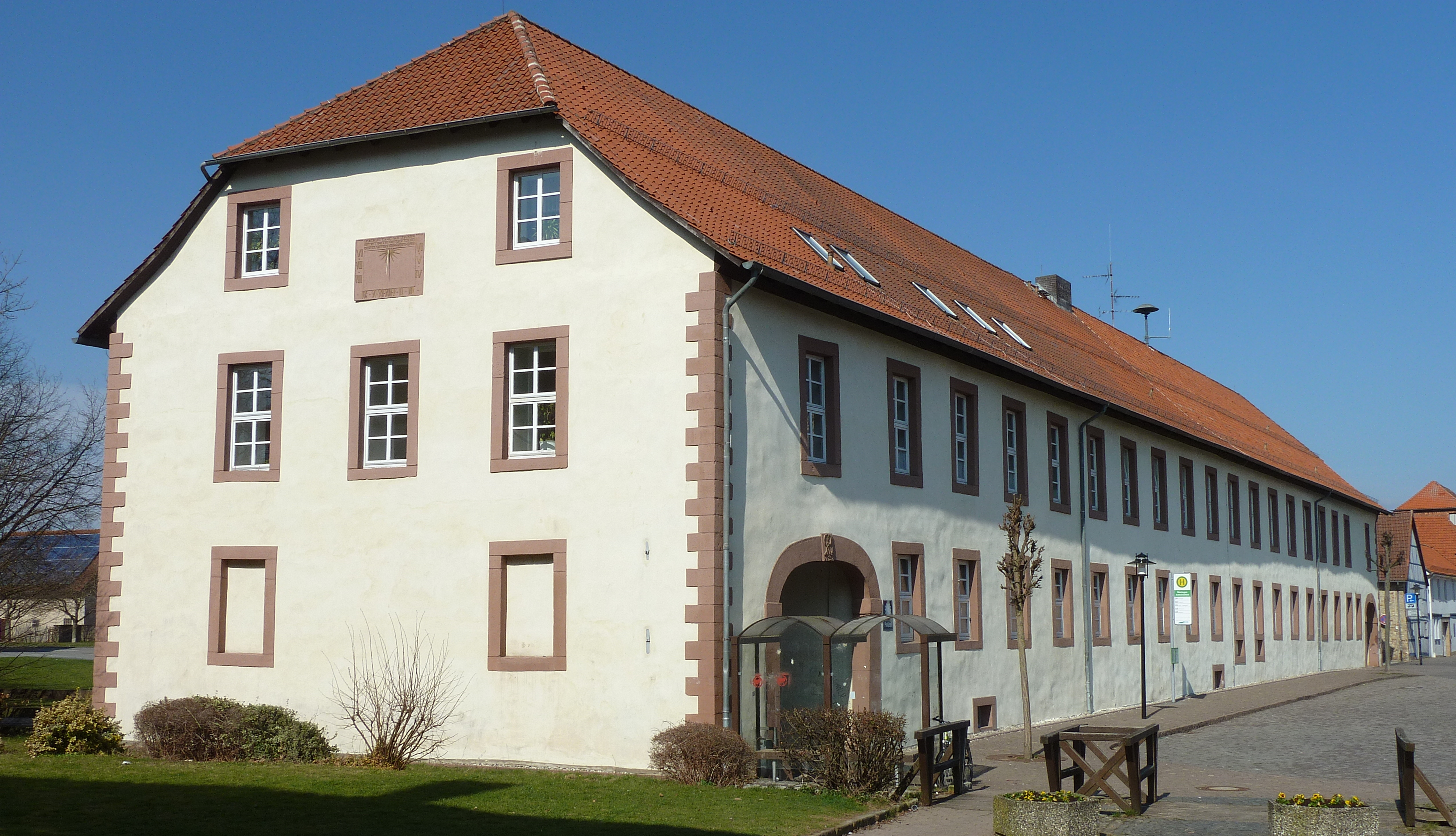 Ehemaliges Wohn- und Stallgebäude des Amtsvorwerks (später Domäne) in Moringen, Landkreis Northeim, Südniedersachsen. Erbaut 1737